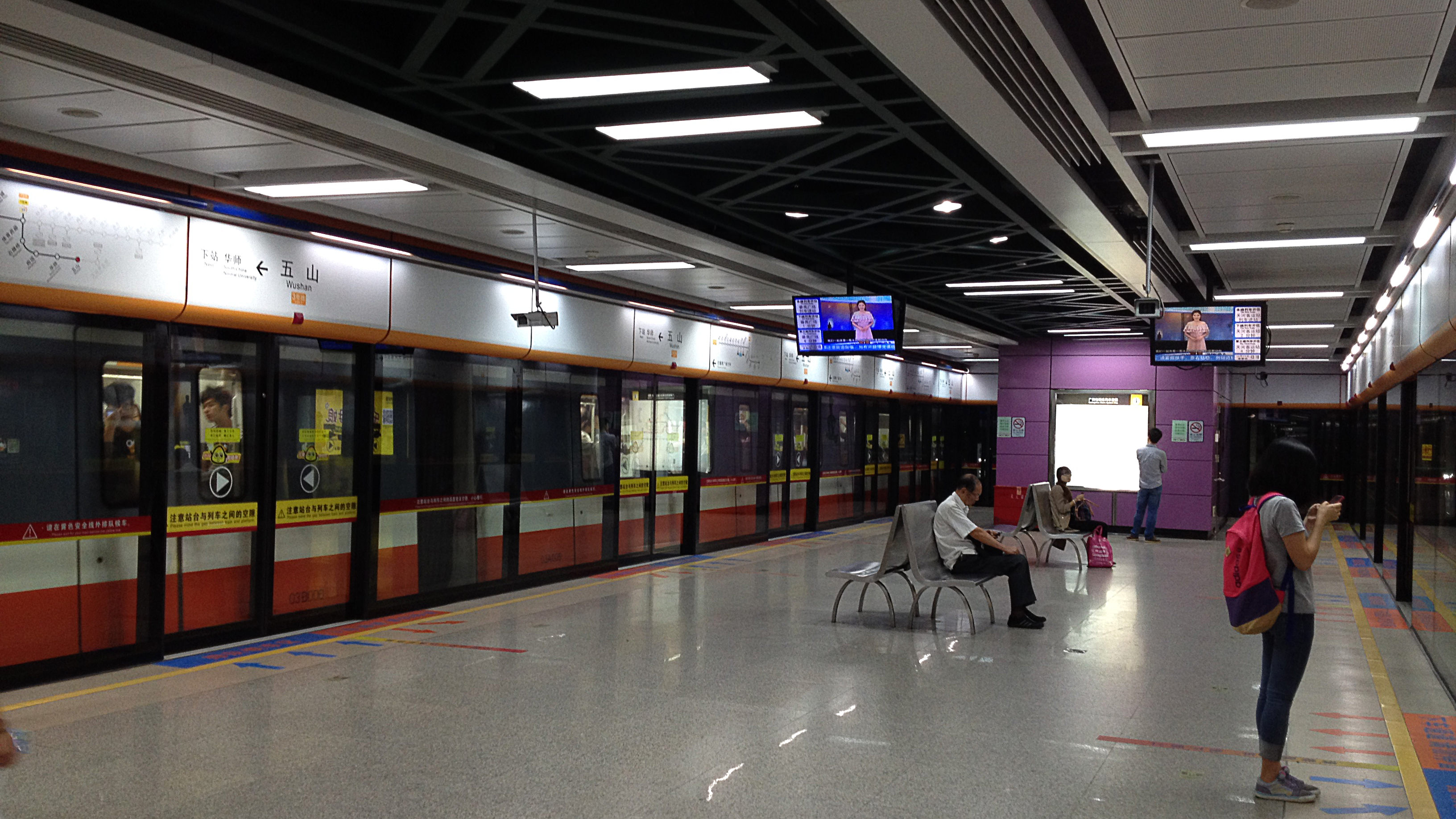 广州地铁五山站月台